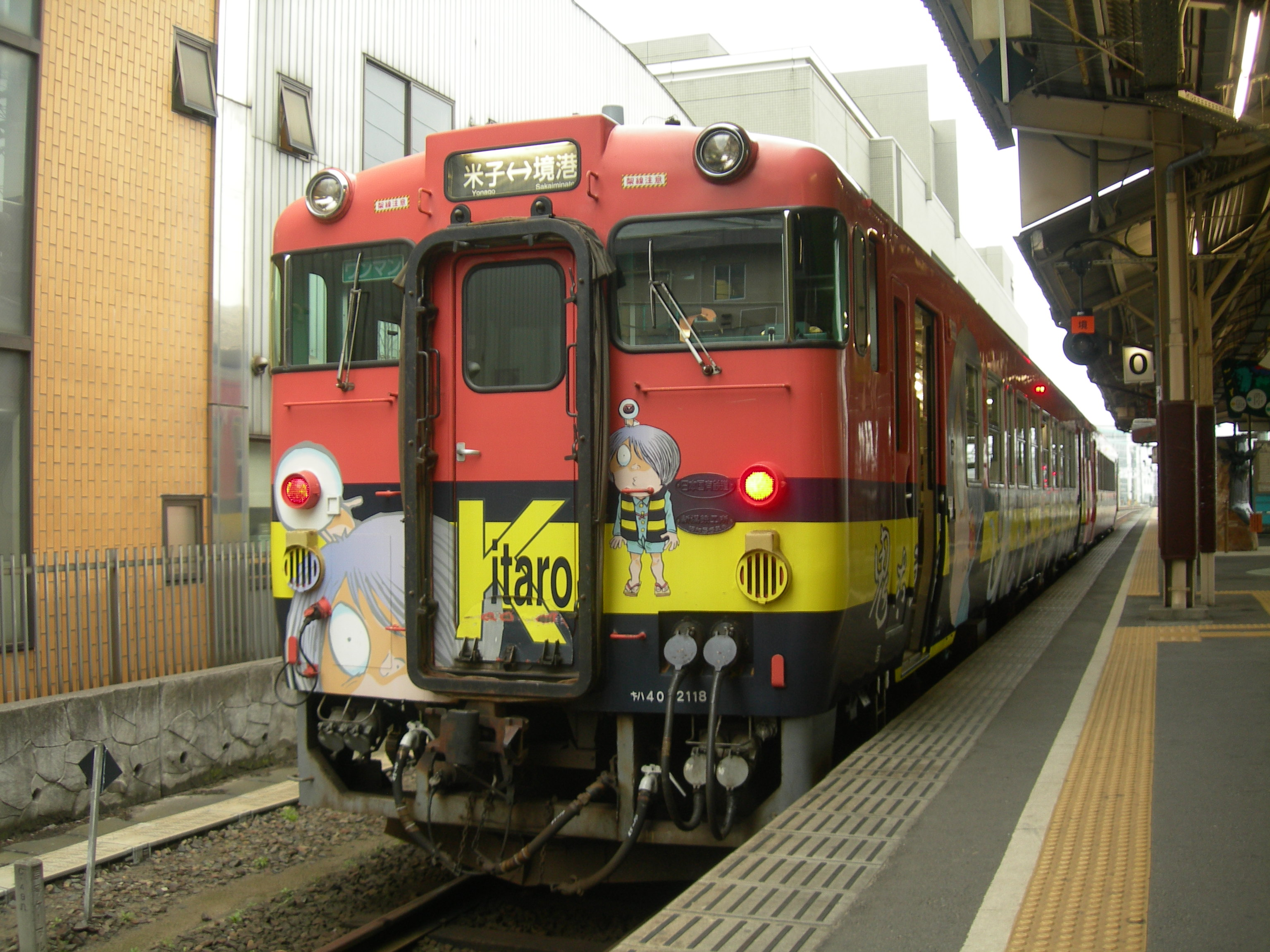 西日本旅客鉄道キハ40形2118。3代目鬼太郎列車。米子駅にて